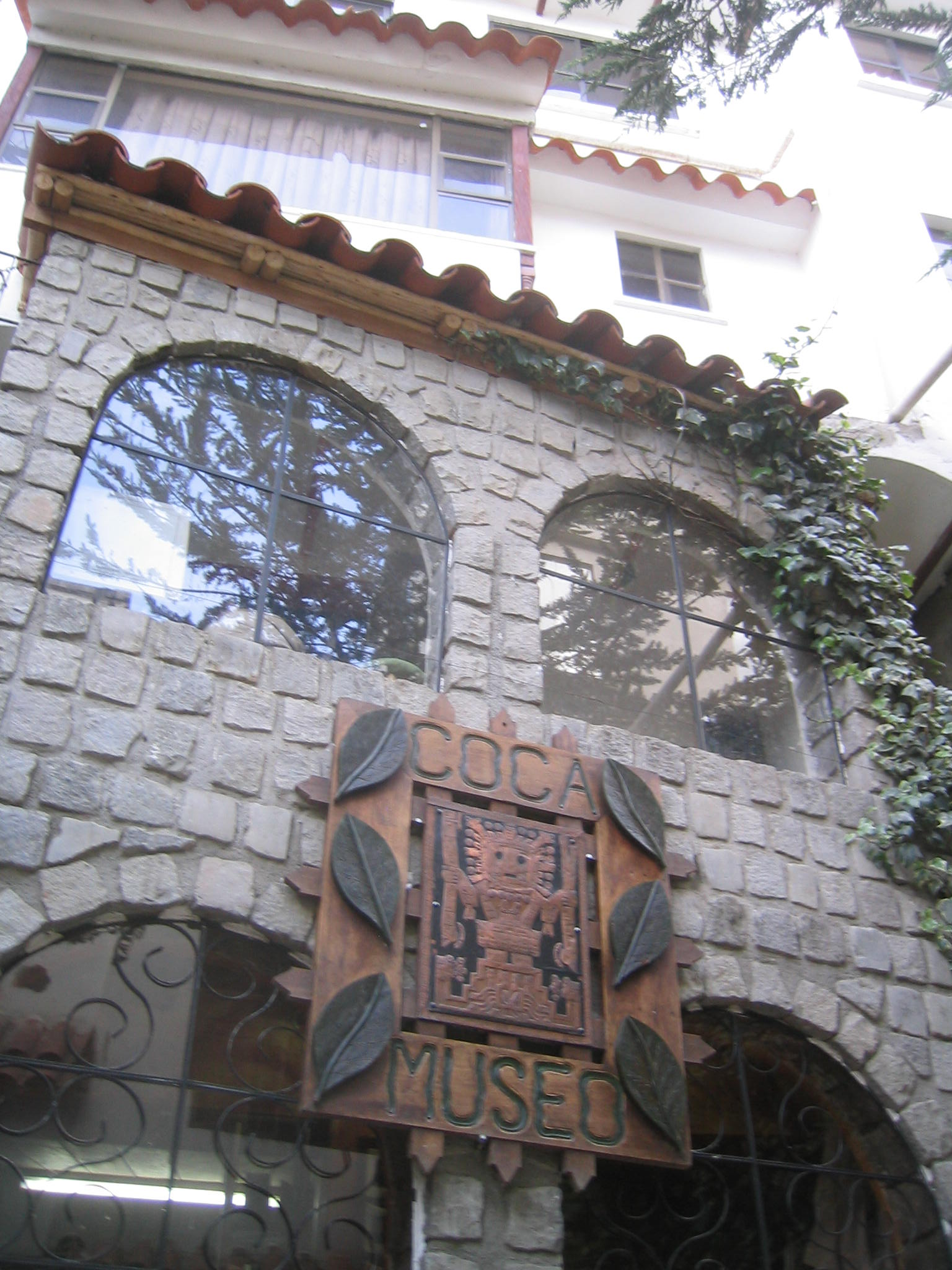 Coca Museum